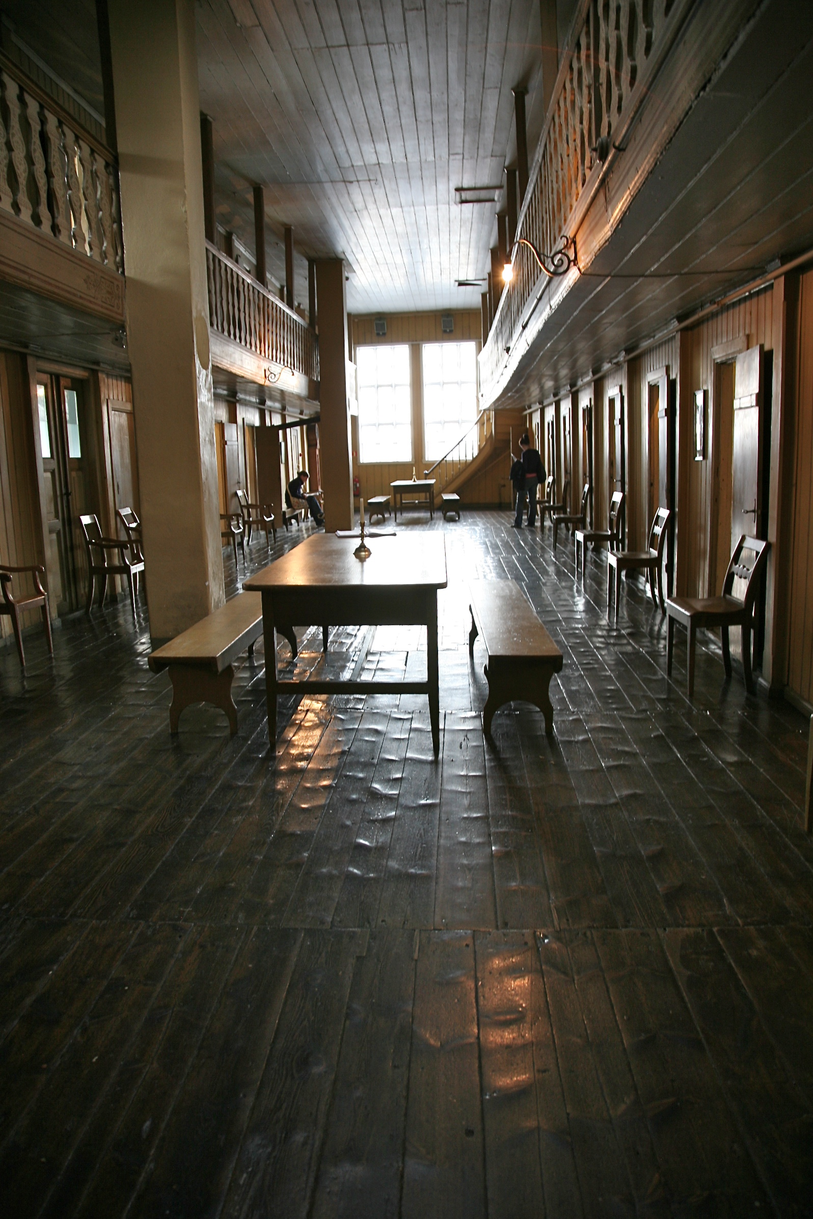 Lepramuseet i Bergen.